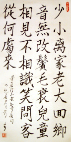 Photographie d'une Nouvelle calligraphie chinoise réalisée par Shānshān 山杉. Collection personnelle de Vincent Ramos publiée pour Wikipédia sous licence GFDL.